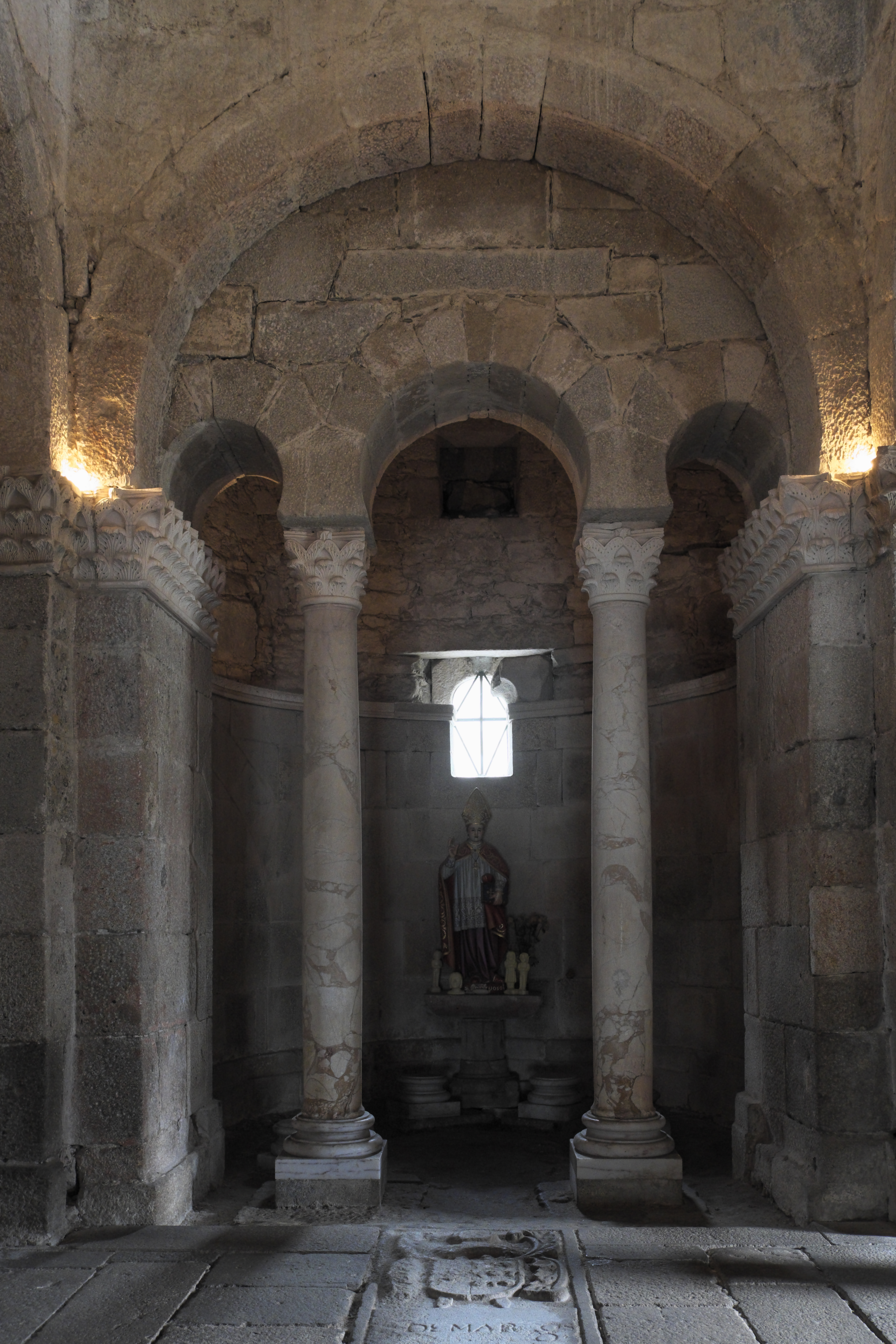 Westgotische Kirche São Frutuoso de Montélios in Real, einer Freguesia von Braga in der Região Norte (Portugal)